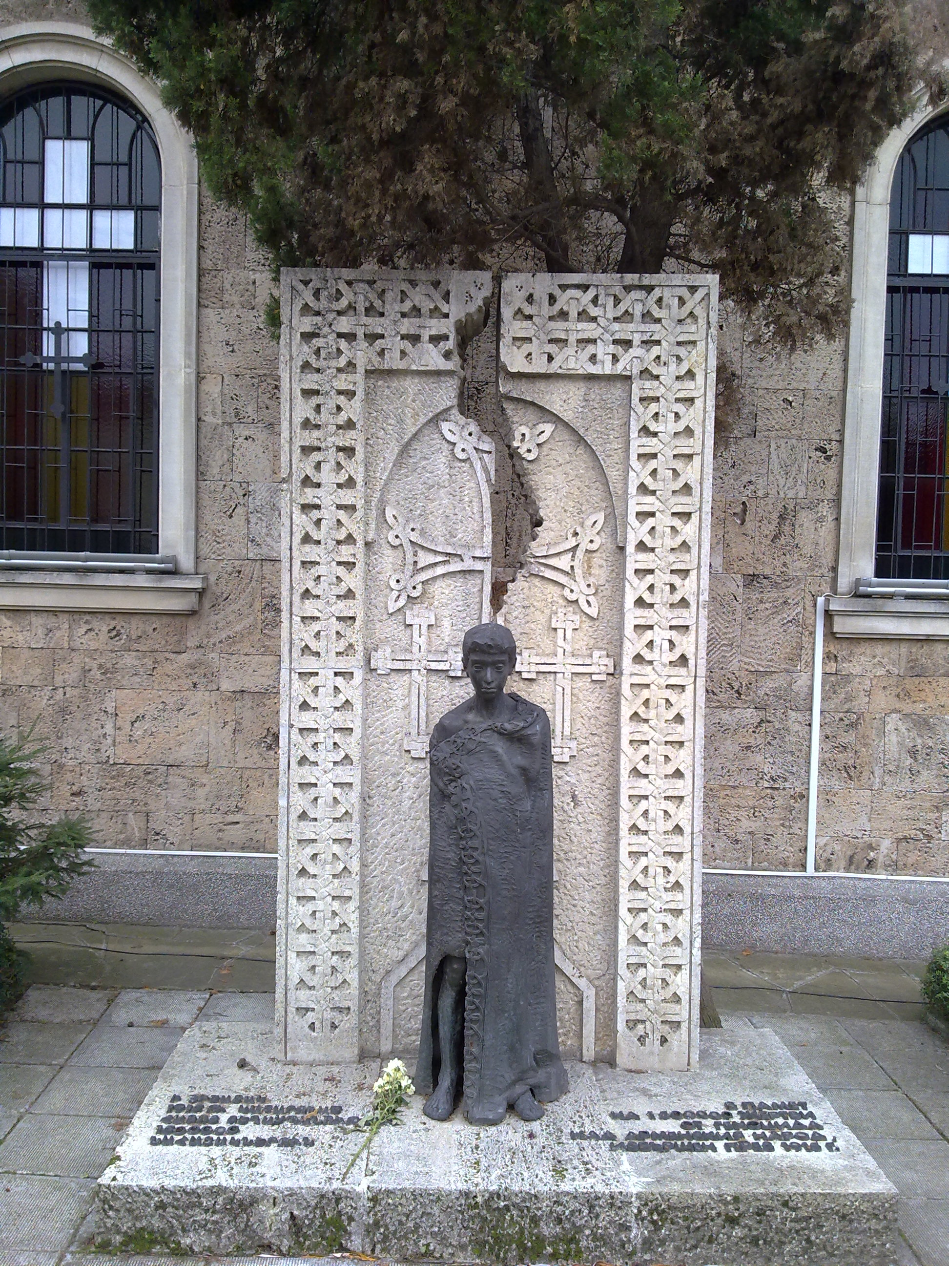 Burgas, Bulgarien: Mahnmal für die im Völkermord an den Armeniern im Osmanischen Reich getöteten Armeniern